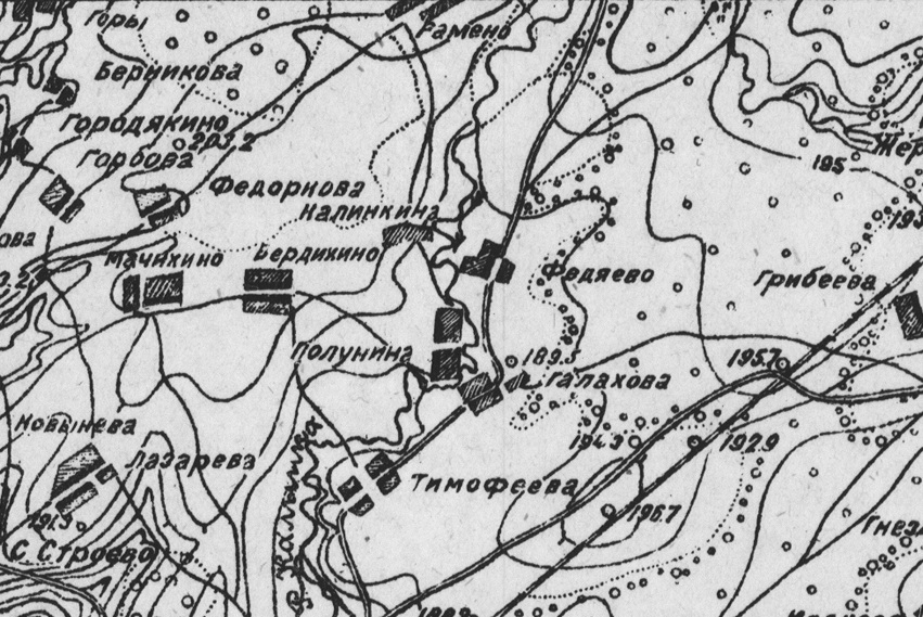 д.Федяево (ныне Образцово) на карте 1920-х годов